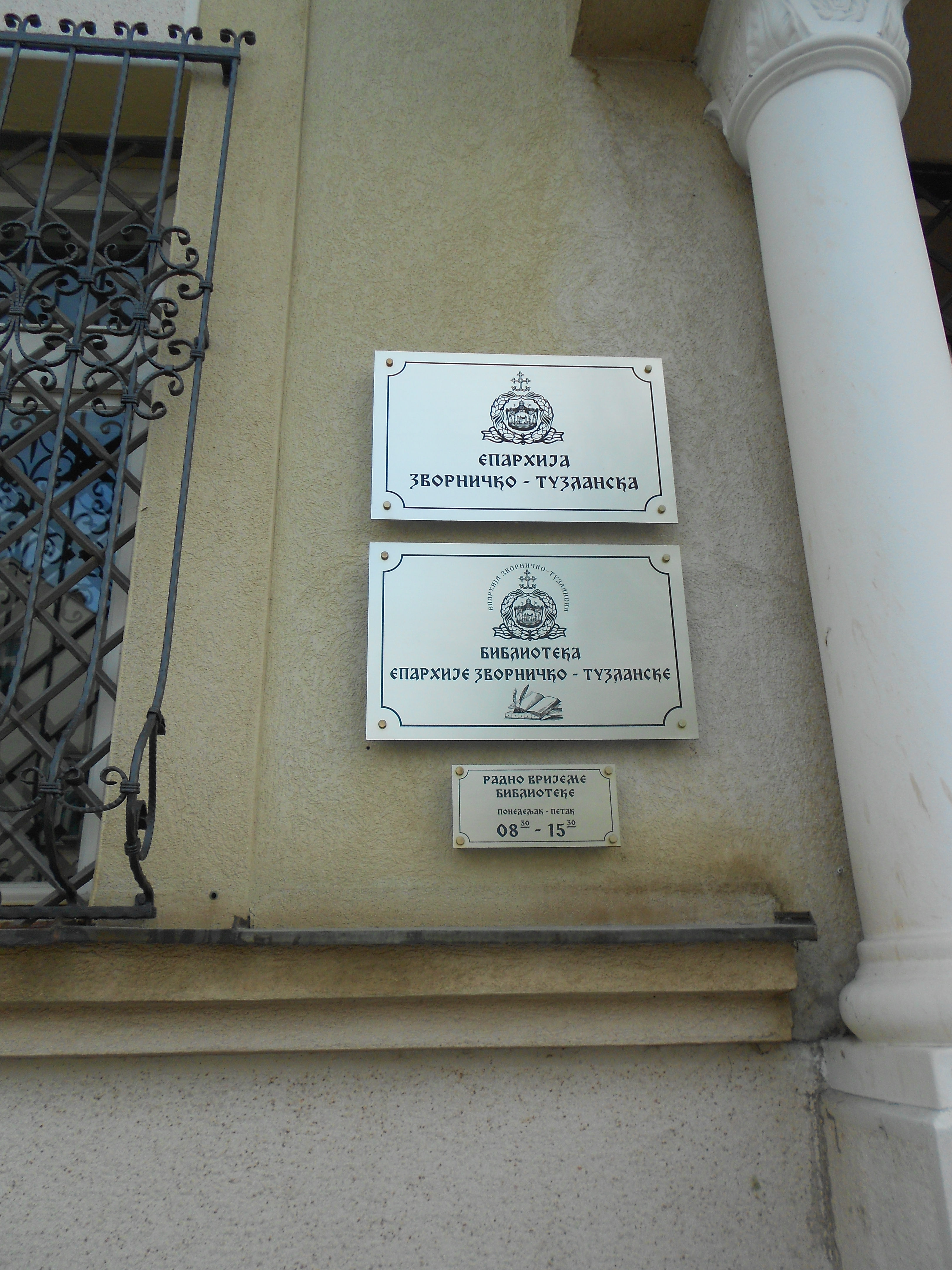 Библиотека Епархије зворничко-тузланске